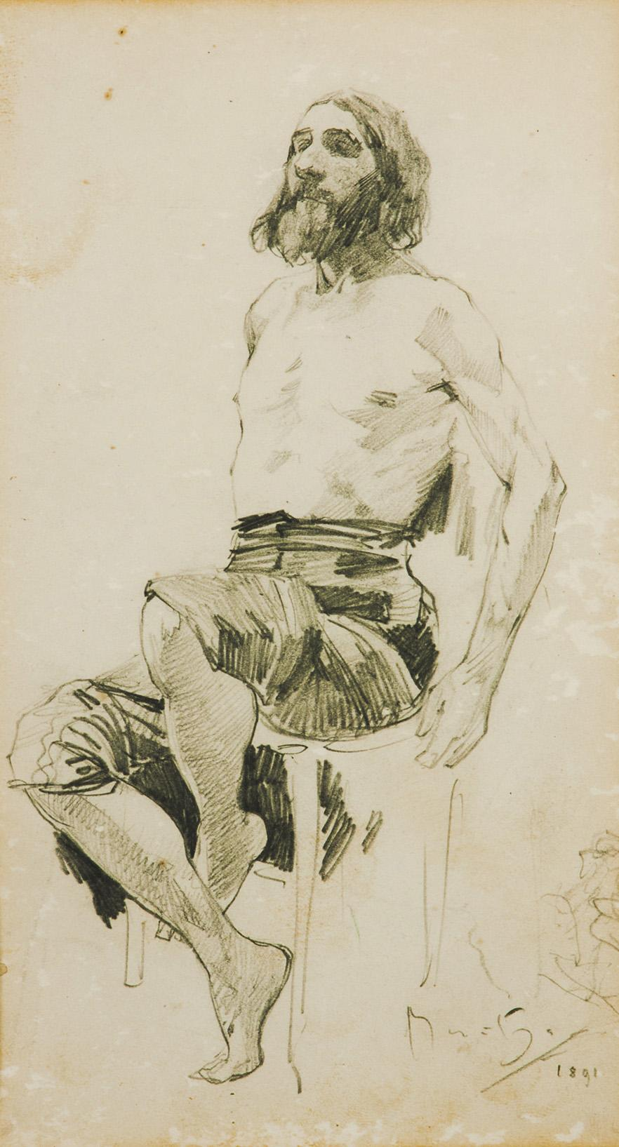 Studie eines sitzenden Mannes, rechts unten signiert und datiert: Mucha 1891, Bleistift auf Papier, 18 x 10 cm